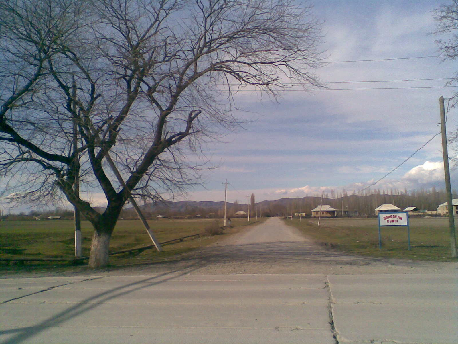 Qaradeyin kəndi